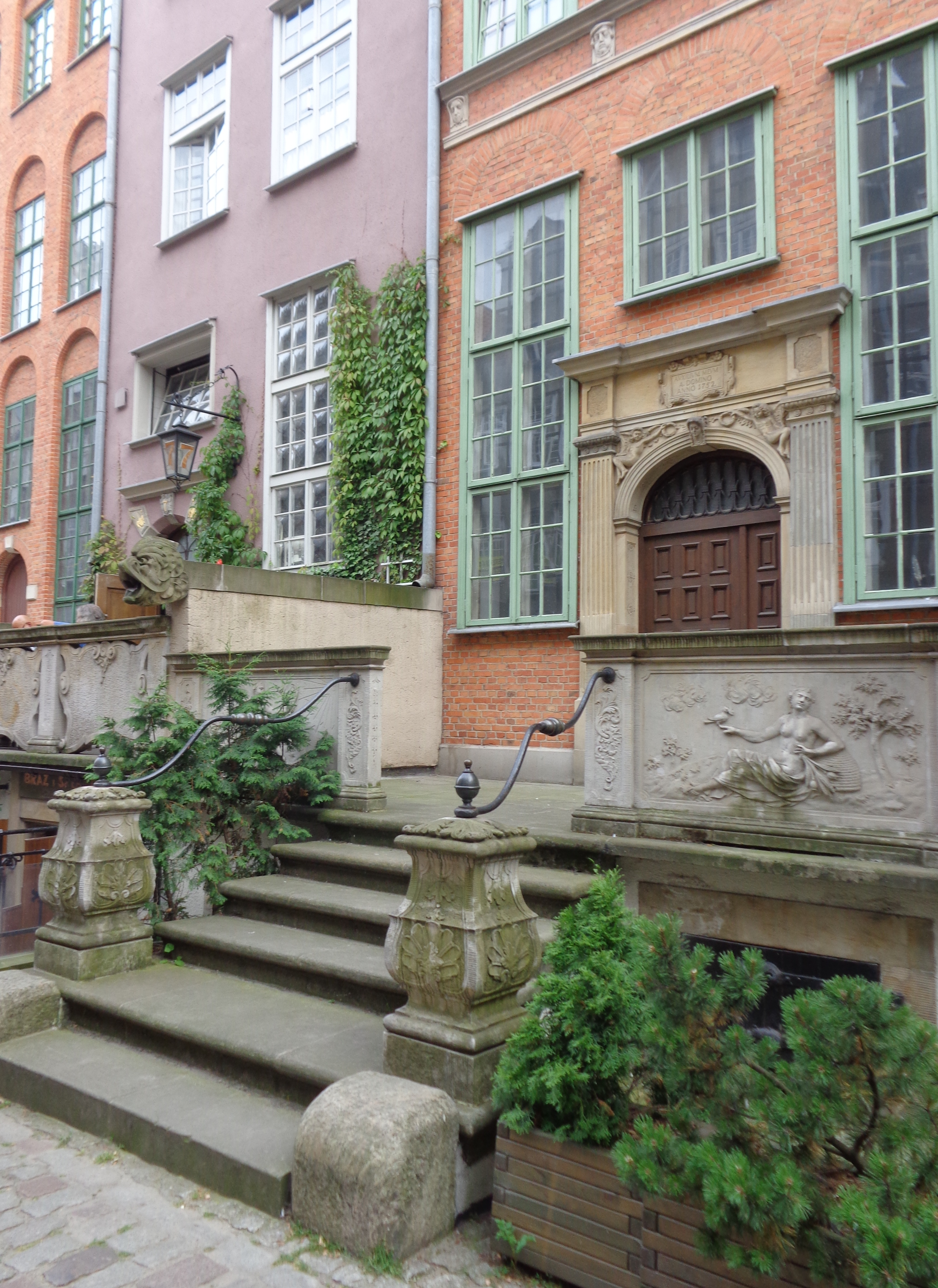 Gdańsk, dom i przedproże, 1600